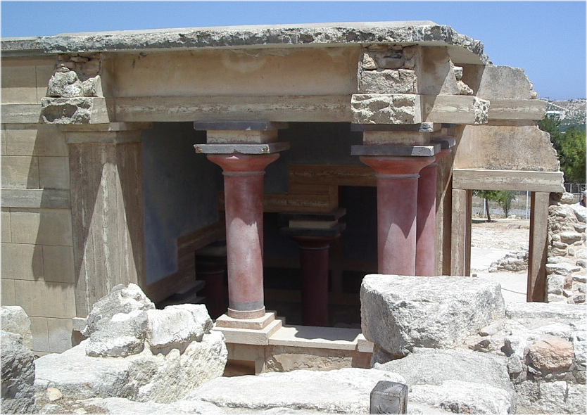 cambrals reials a Cnossos, foto propia